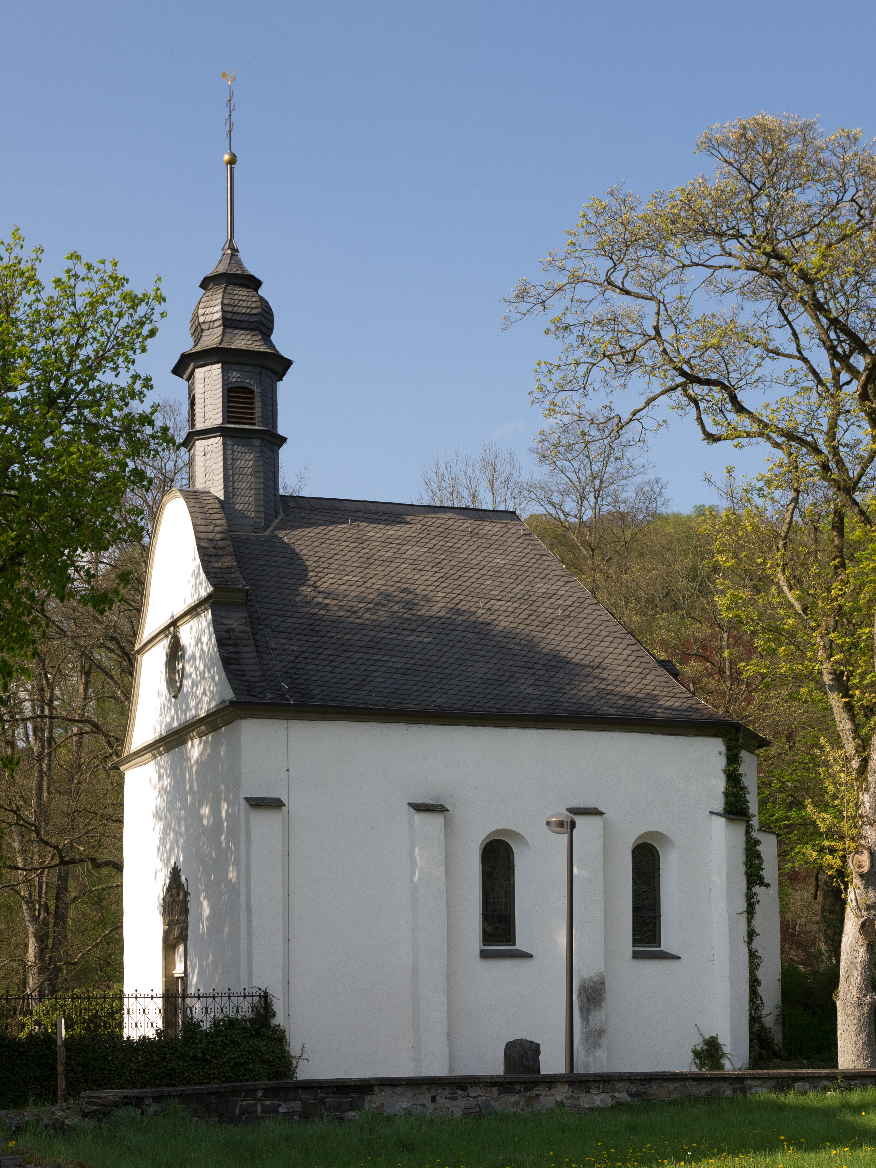 Meschede-Laer Schlosskapelle dem Heiligen Johannes dem Täufer gewidmet, Südseite, Baudenkmal